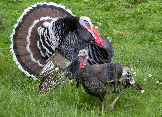 para indyków - samiec (z tyłu) samica (z przodu)